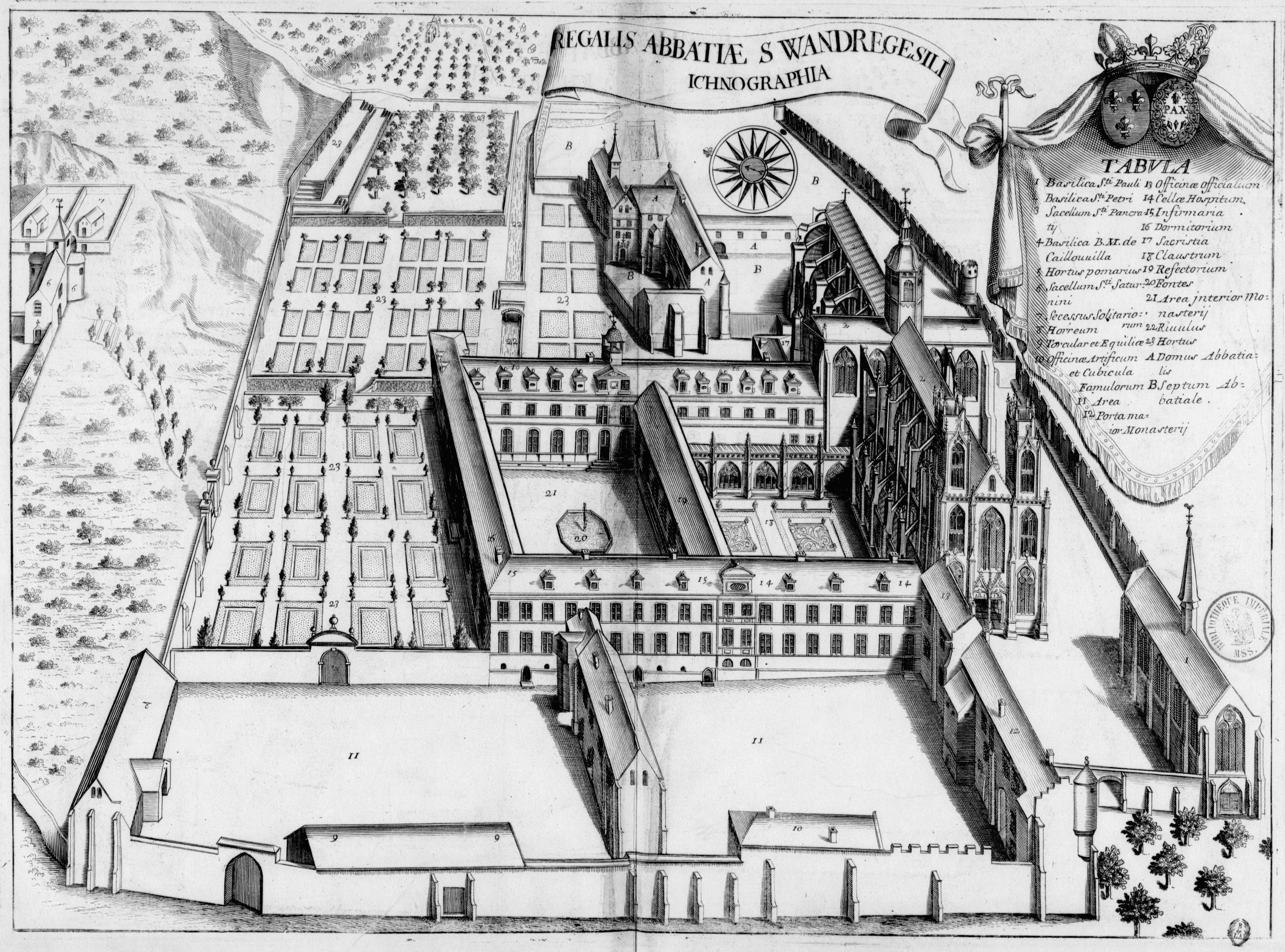 Planche gravée du 17ème siècle représentant l'abbaye Saint-Wandrille, dans le livre Monasticon Gallicanum.